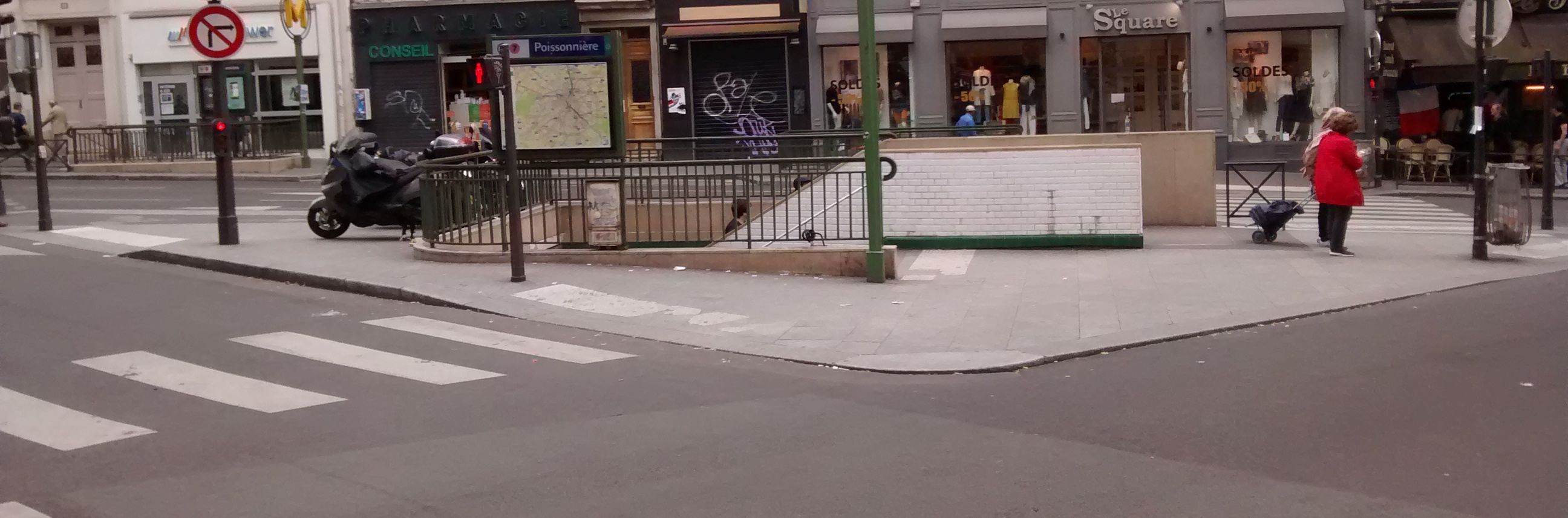 Place du 8 Novembre 1942, Paris.